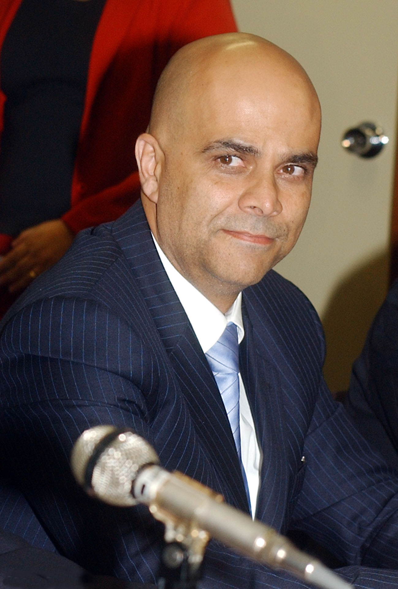 Brasília - Publicitário Marcos Valério, depõe na corregedoria da Câmara. Foto: José Cruz/ABr